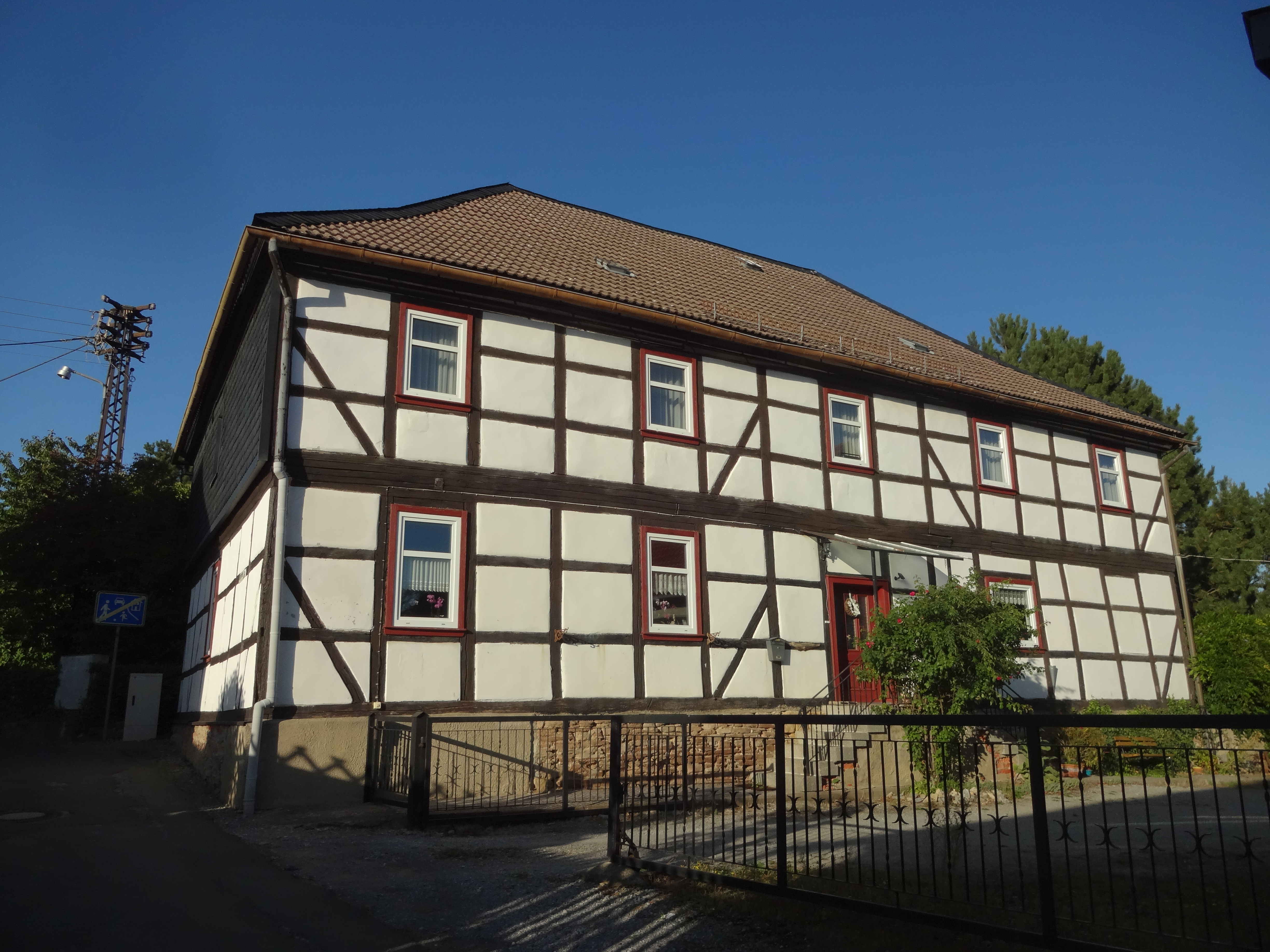 denkmalgeschütztes Hospital in der Unterstraße 1 in Heimburg